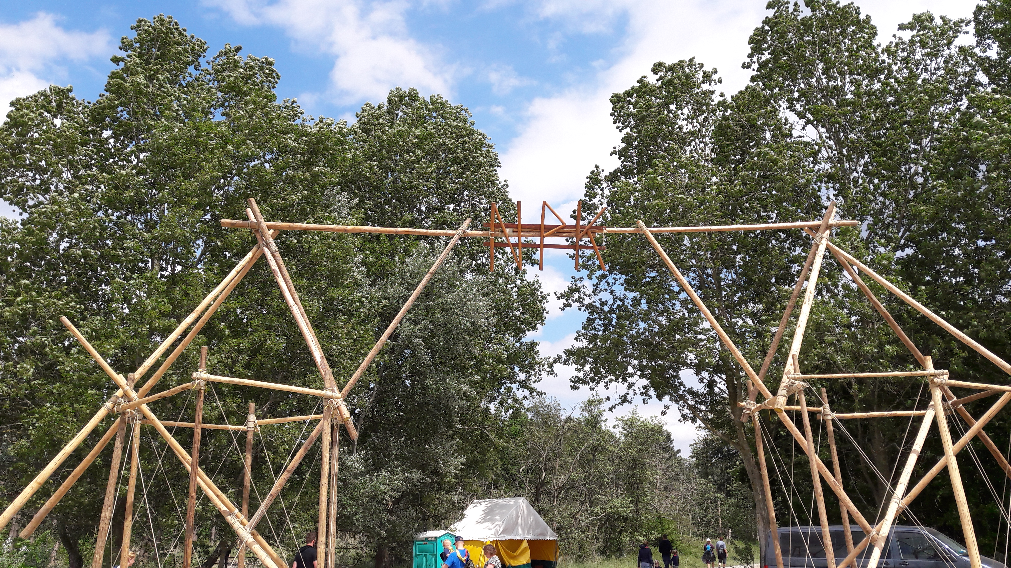 Poort van het Noordelijk Pinksterkamp 2017